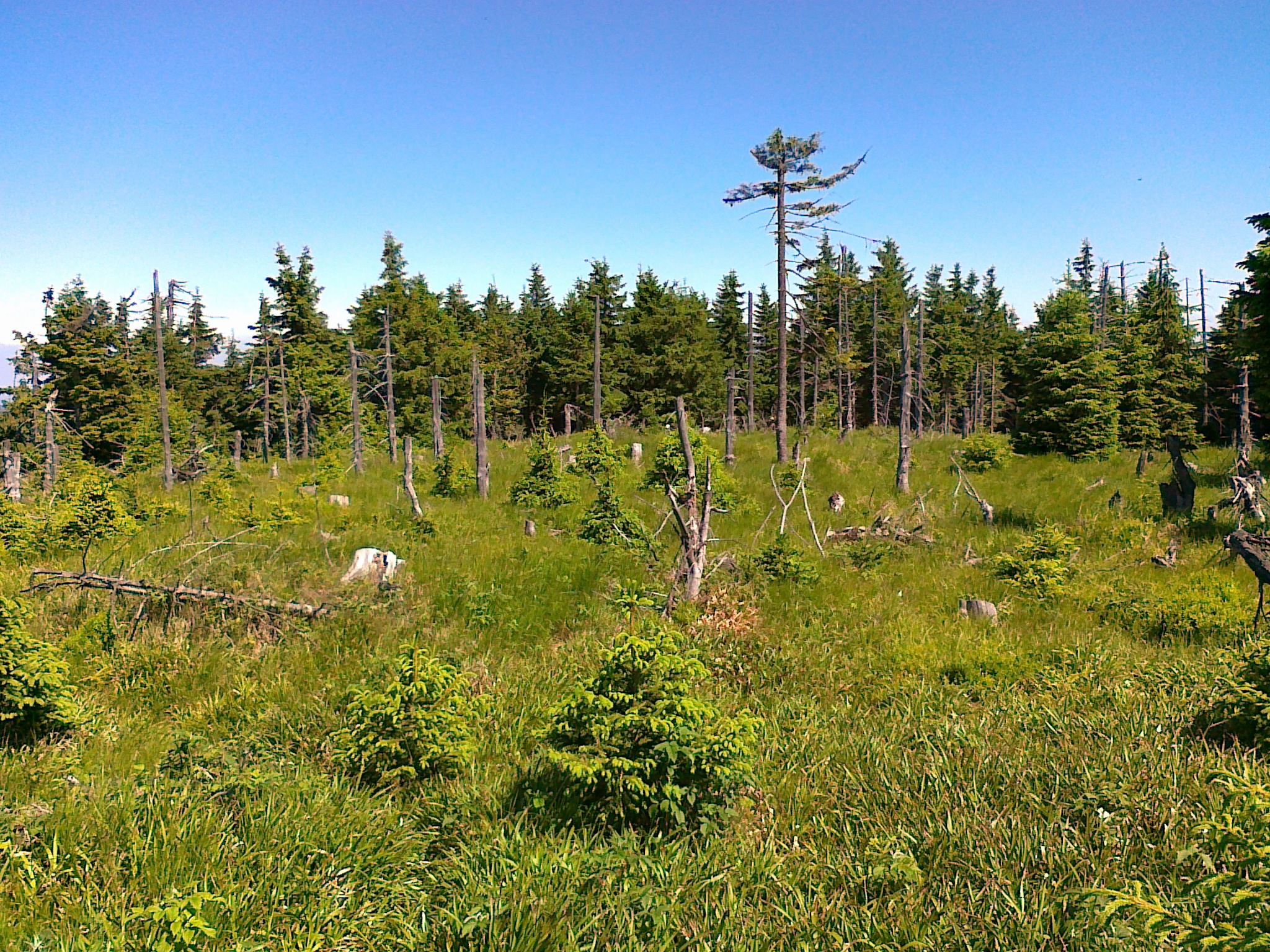 Widok na polanę szczytową góry Medvědí vrch - 1216 m n.p.m.